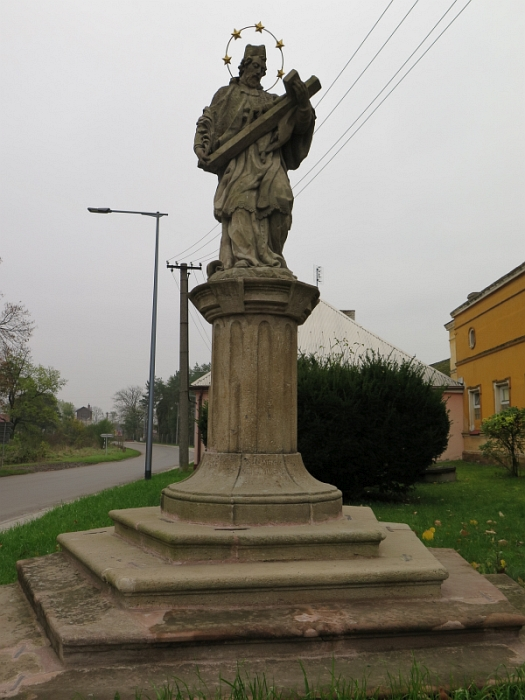 Socha svatého Jana Nepomuckého, Nádražní, Křinec.